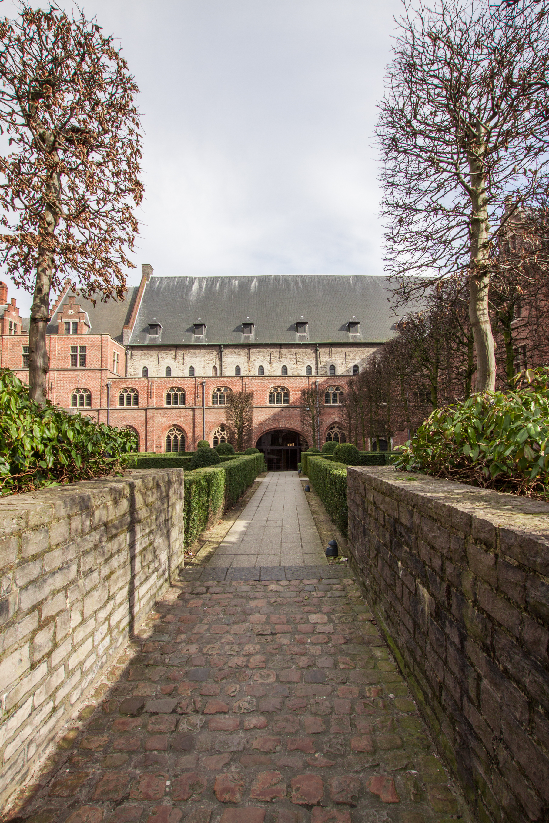 Pand - Onderbergen